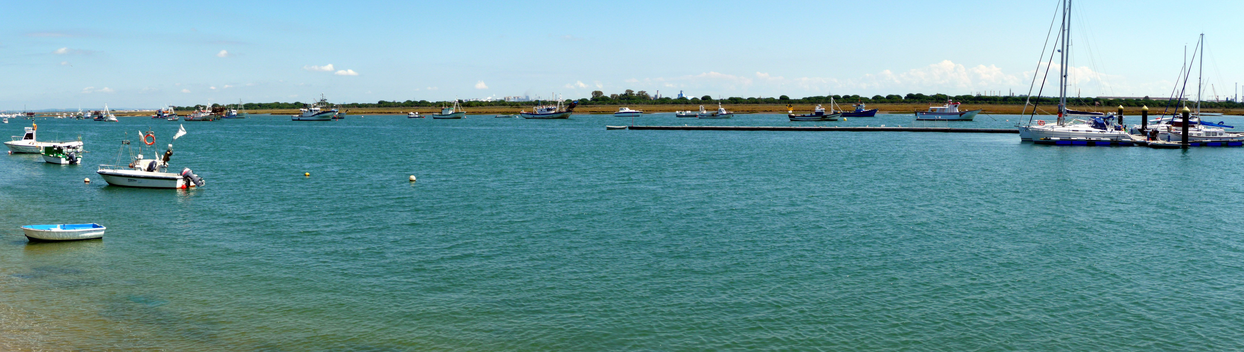 Punta Umbría. (Huelva - España)